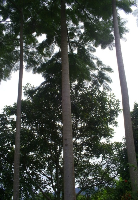 Tambor Nombre Científico: Schizolobium Parahyba Familia: Caesalpiniacea Uso: Fijacion de nitrogeno